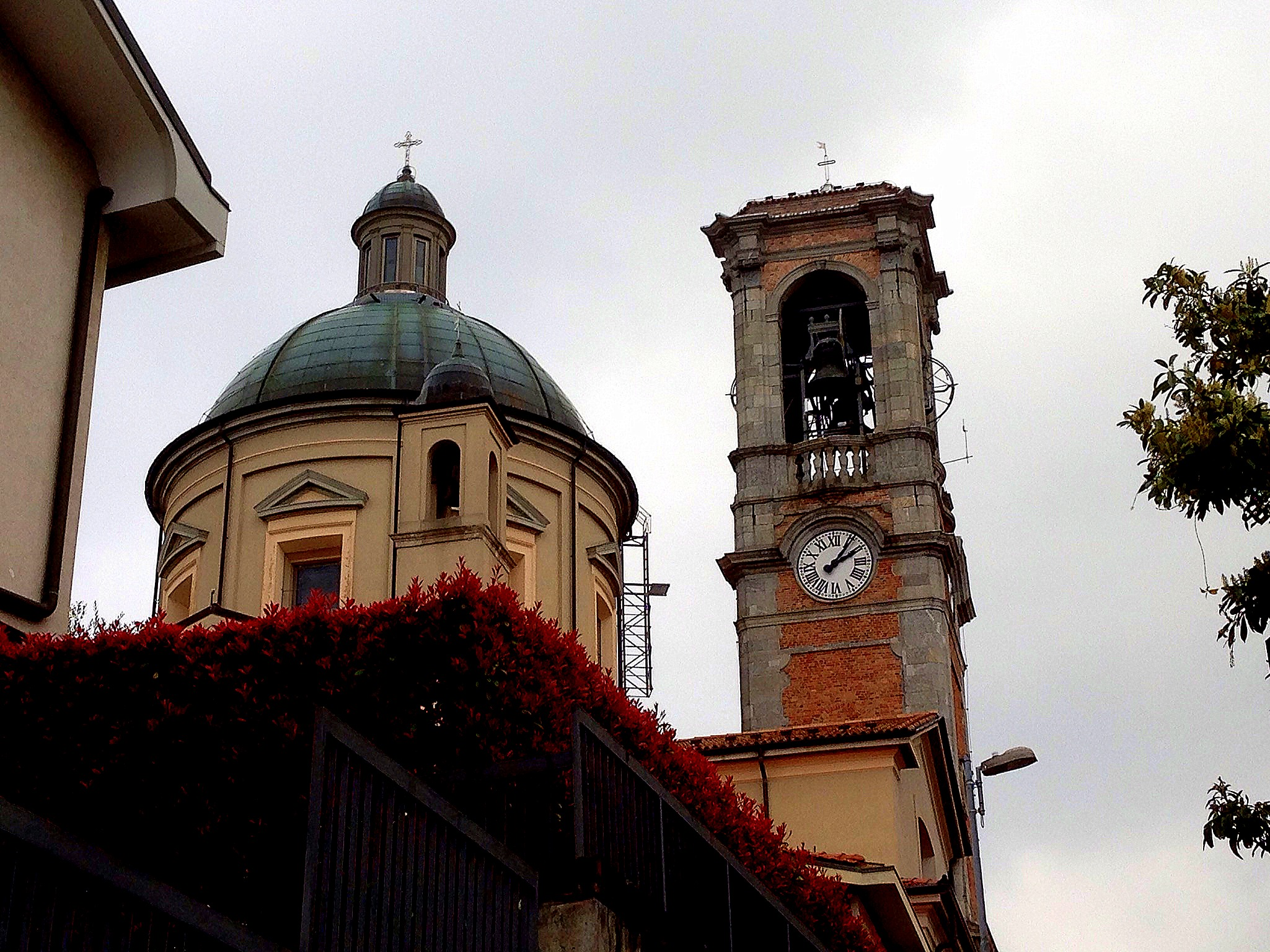 Appiano Gentile - Chiesa prepositurale di Santo Stefano